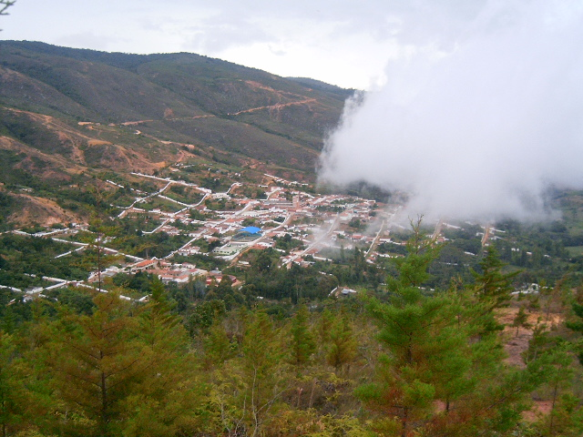 A los betulianos los conocen con el apodo de "traganubes"